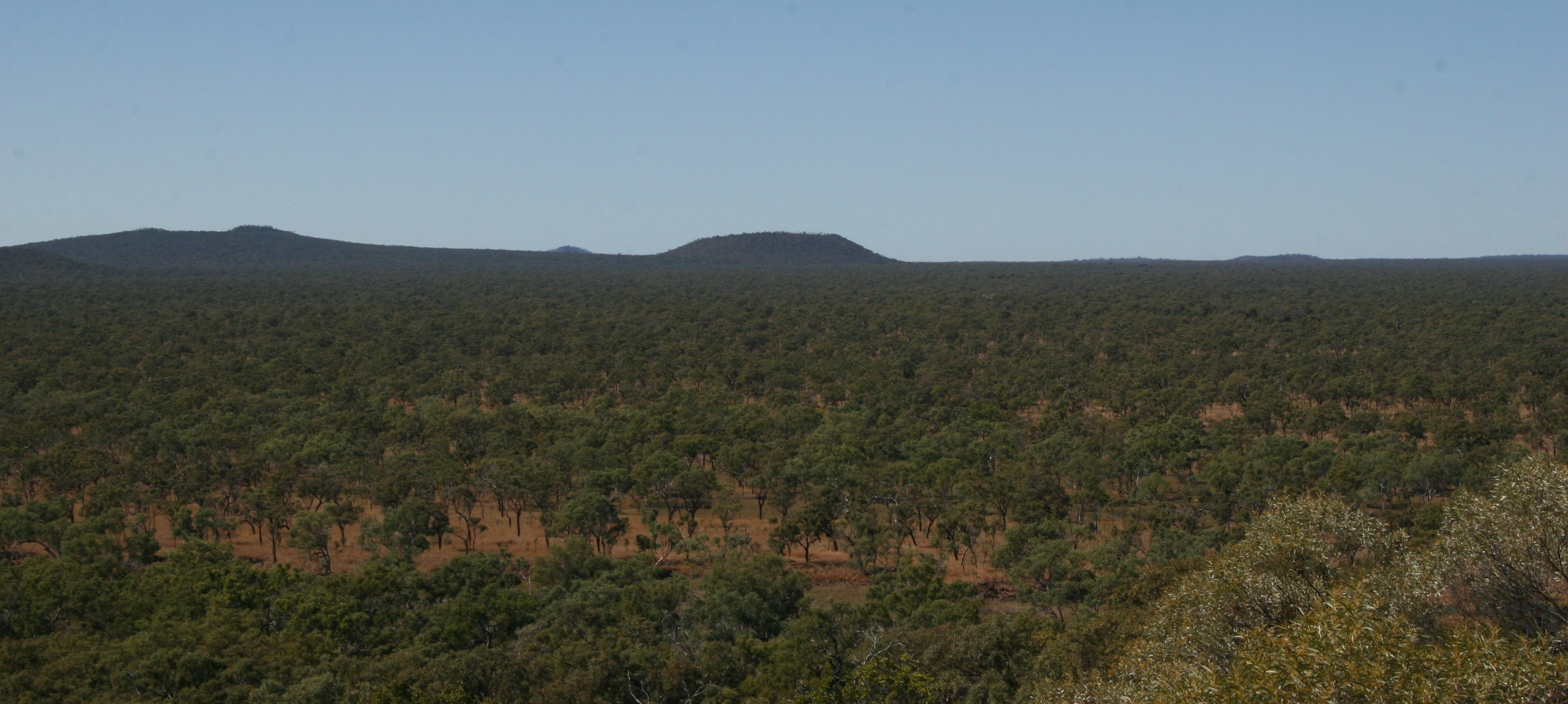 Geländeprofil des Undara-Nationalparks mit dem Kalkanikrater